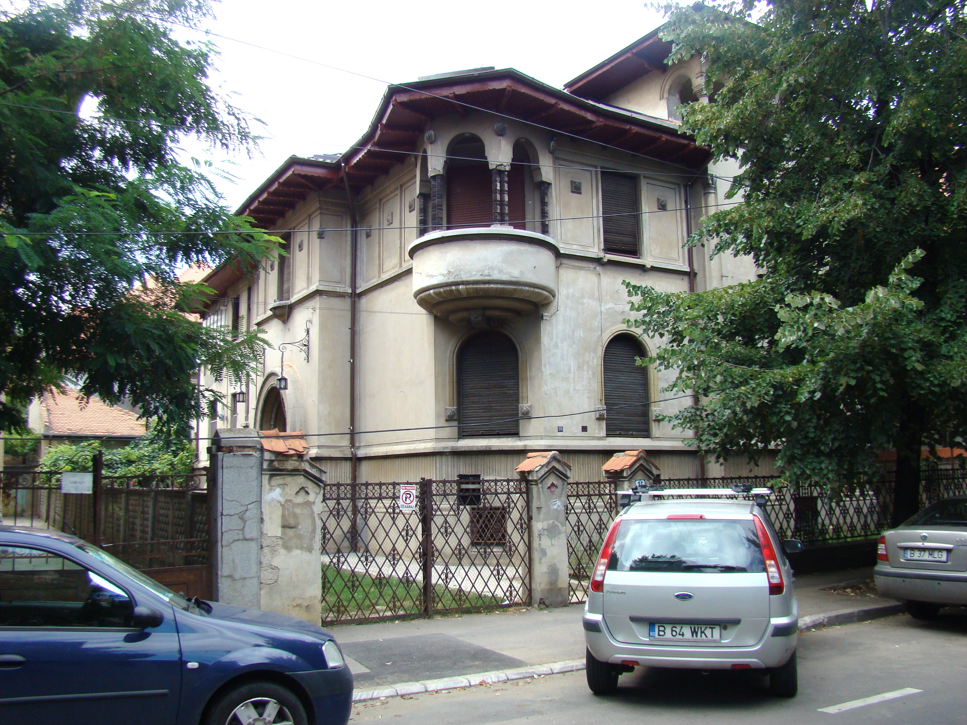 Casă monument istoric, str. Roma, nr. 35